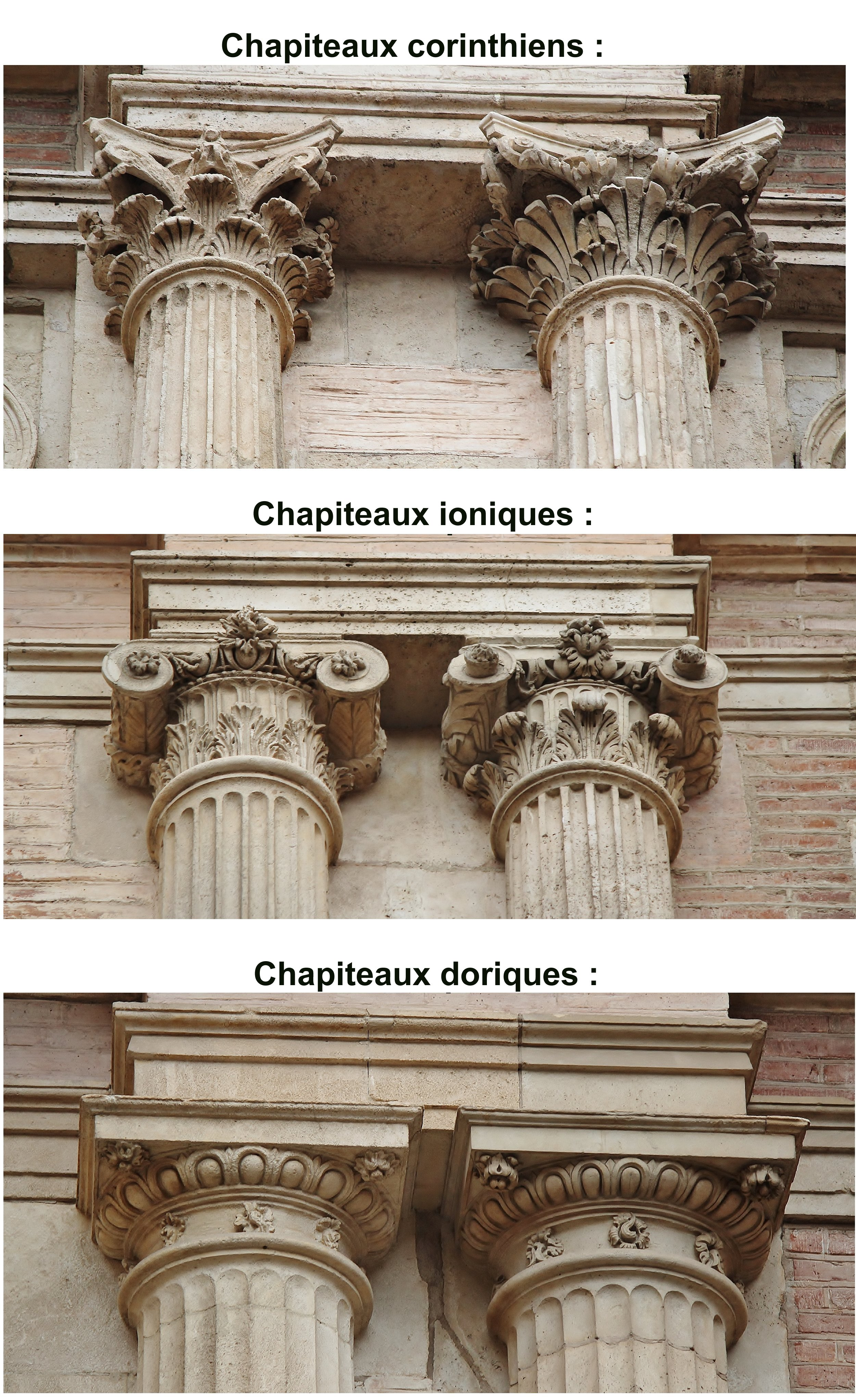 Chapiteaux doriques, ioniques et corinthiens à l'hôtel d'Assézat, Toulouse (1555-1557).